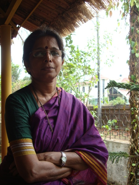 Vaidehi. Poet, Novelist.